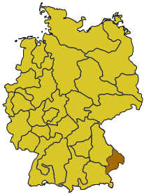 Karte Bistum Passau